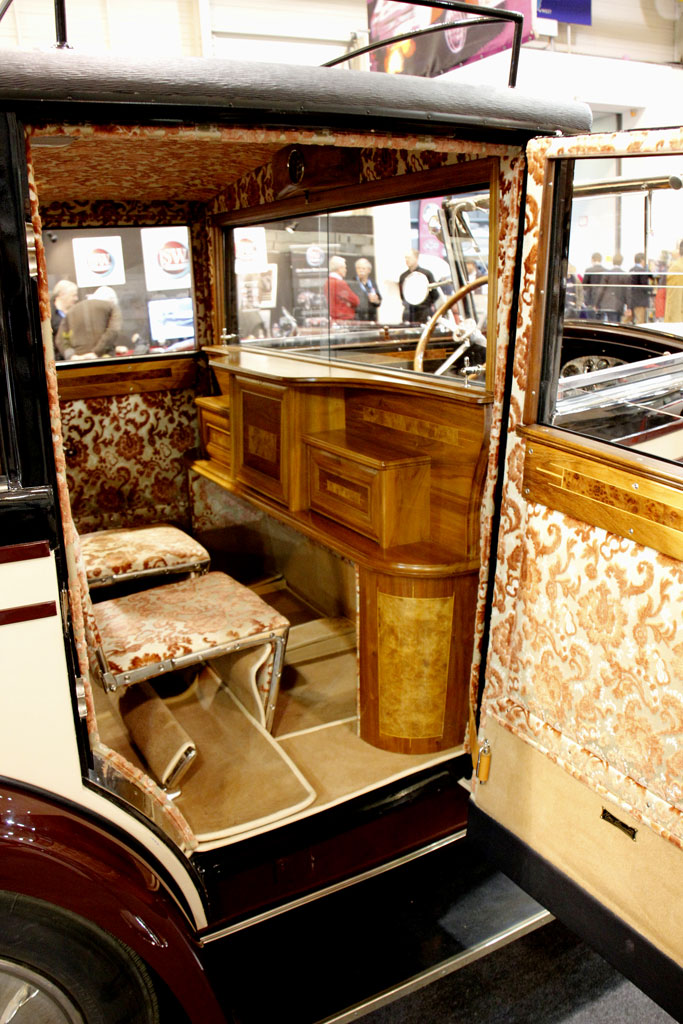 1928-29 Peugeot Typ 184_IMG_2848